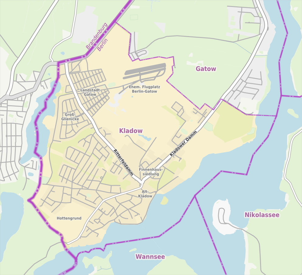 Übersichtskarte der Straßen und Ortslagen in Berlin-Kladow